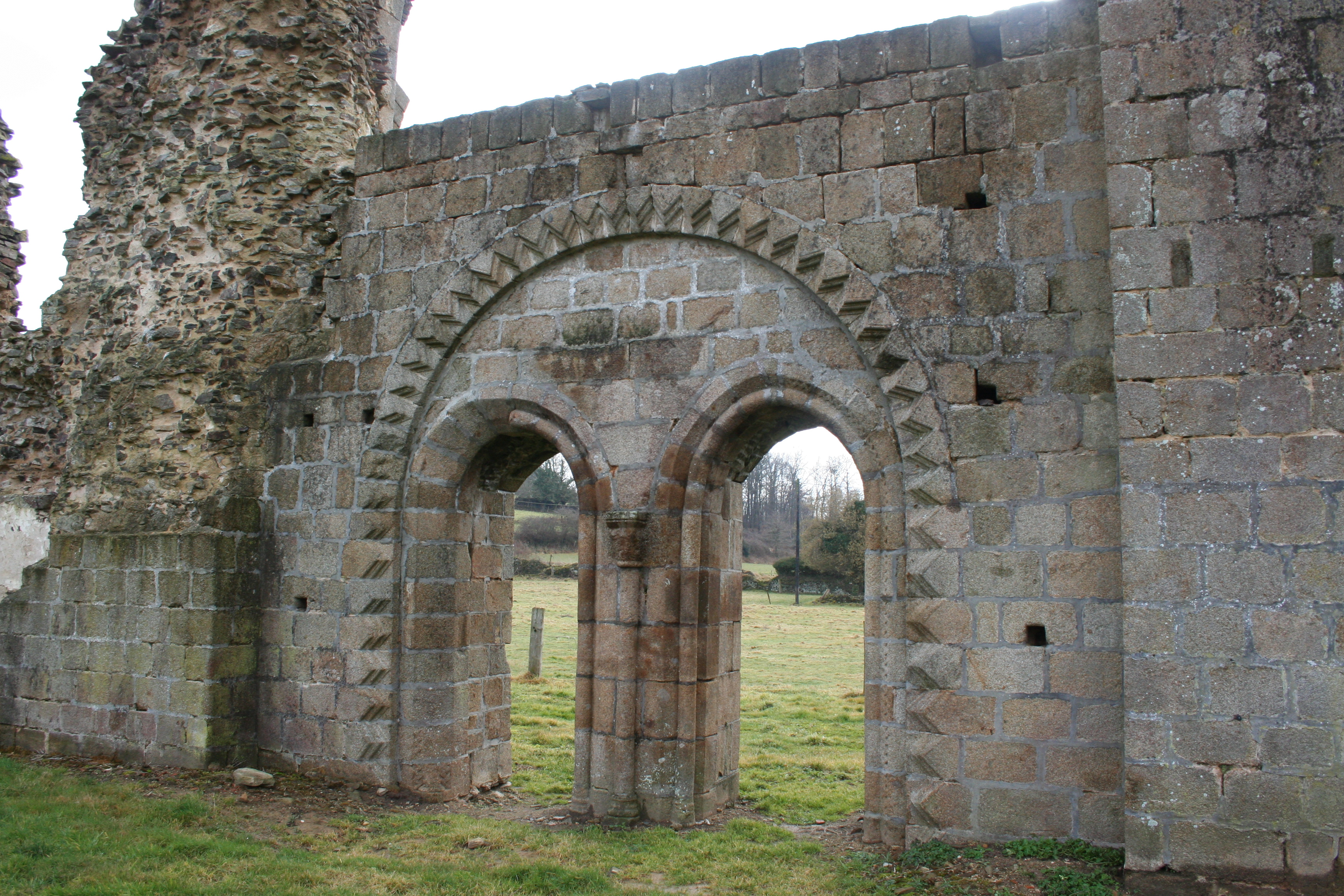 Porche d'accès entre le cloitre et l'extérieur entre le dortoir et le réfectoire. Vue des ruines de l'abbaye de savigny le vieux, manche, france